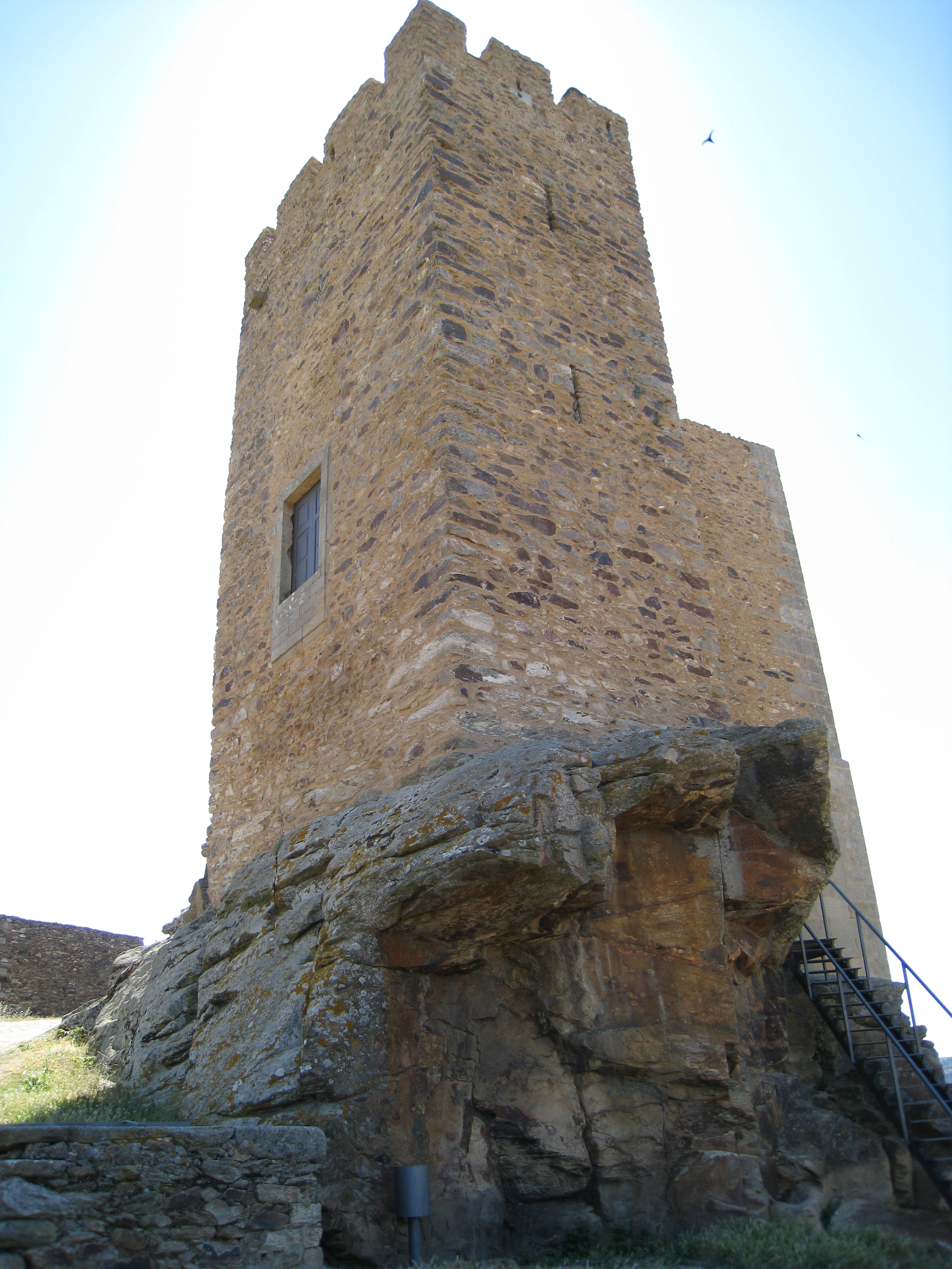 Mogadouro_7